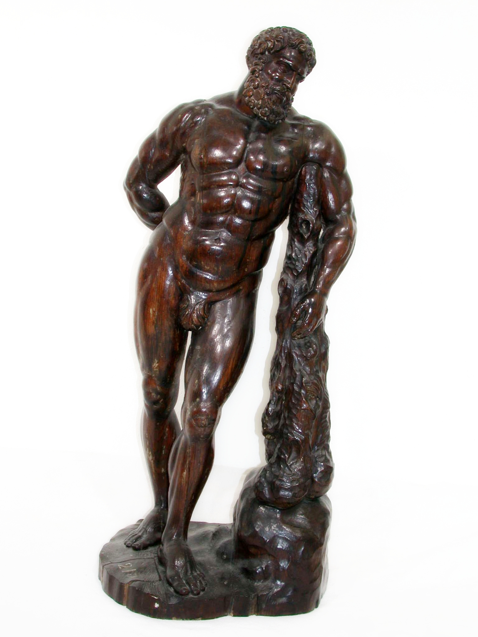 Kopie (studiestuk) van Hercules Farnese, naar het Griekse origineel van Lysippos.